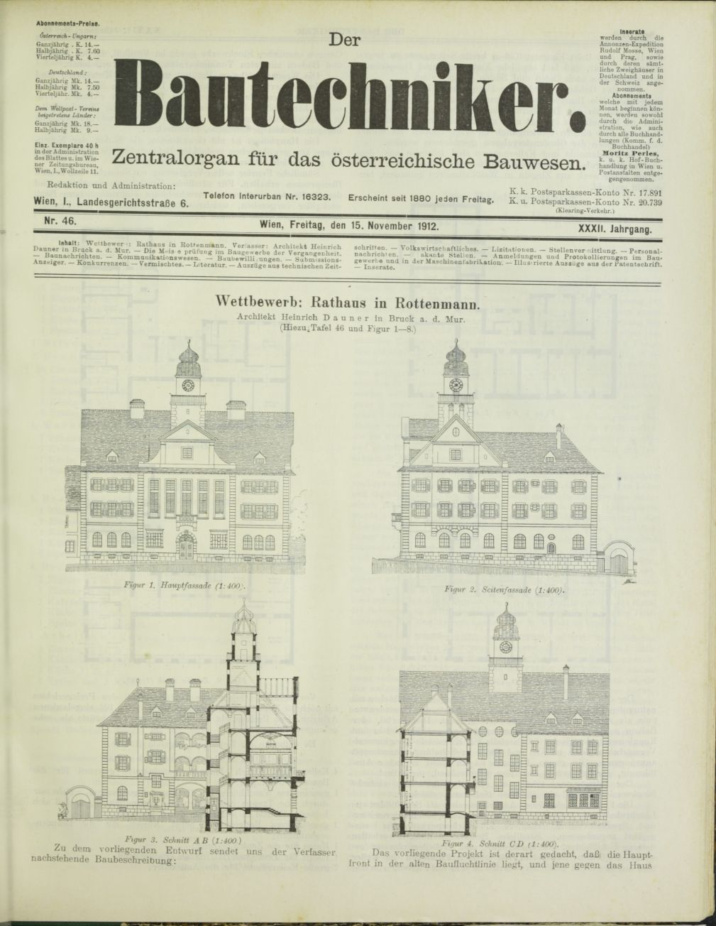 Alt